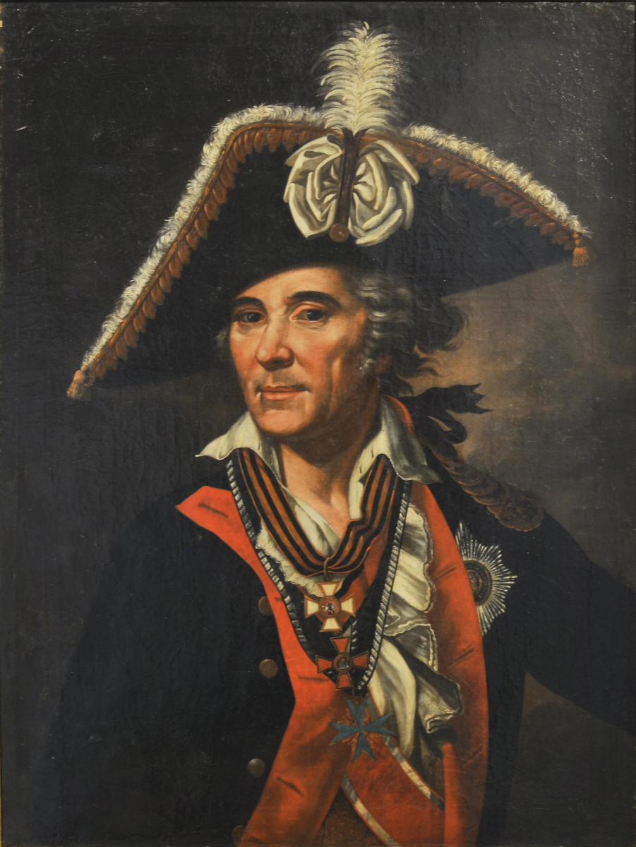 Фролов-Багреев Алексей Петрович